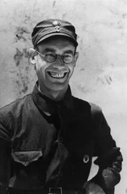 李德，曾任共产国际驻华军事顾问，被中共认为对第五次反围剿失败负主要责任。